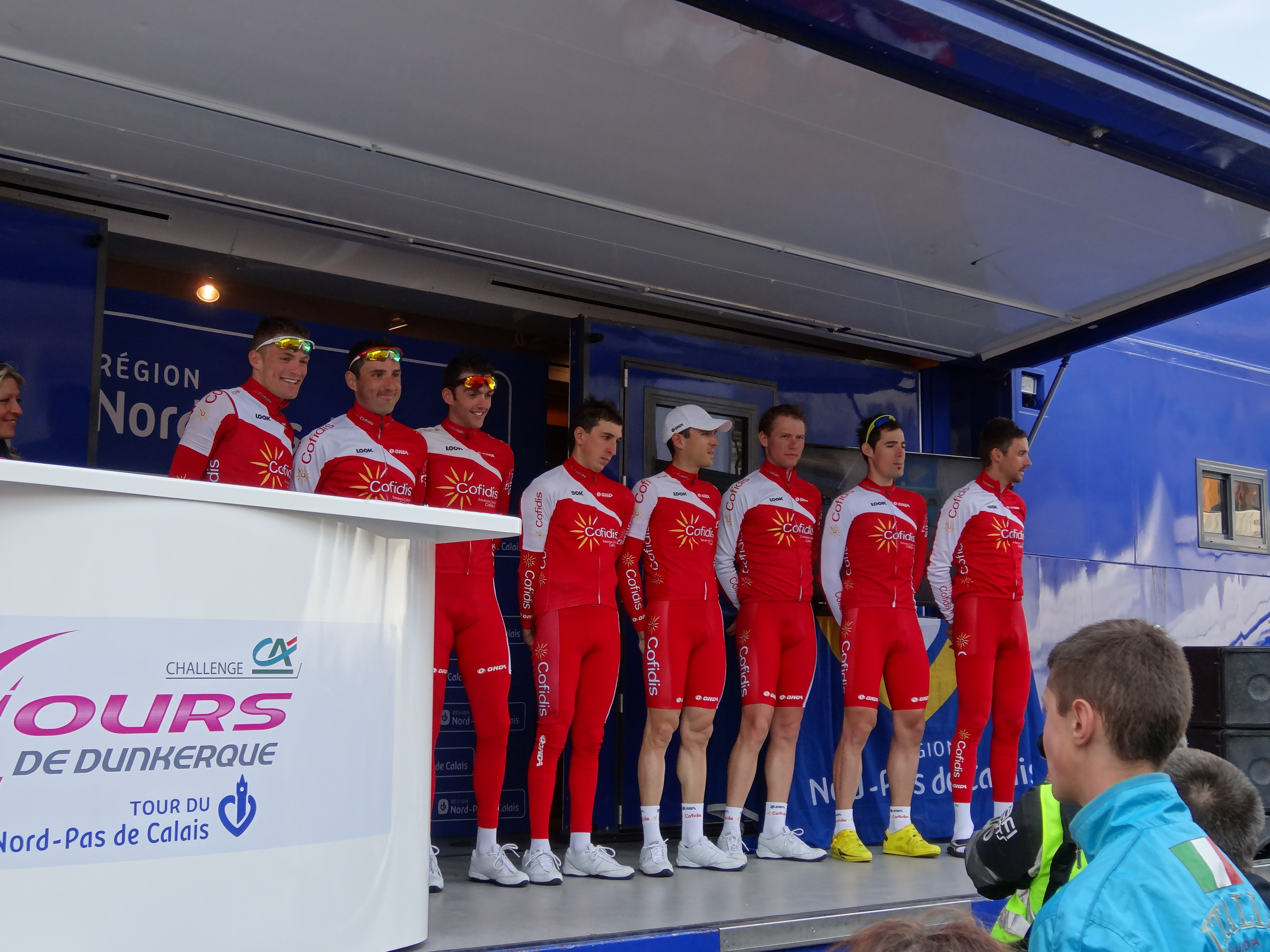 Reportage photographique réalisé le mercredi 1er mai 2013 au départ de la première étape de l'édition 2013 des Quatre jours de Dunkerque à Dunkerque, Nord, Nord-Pas-de-Calais, France. Le dossier photographique montre des véhicules de course exposés, la caravane publicitaire, la présentation des coureurs, et le départ. Depicted people: Adrien Petit, Arnaud Labbe, Edwig Cammaerts, Romain Hardy and Romain Lemarchand